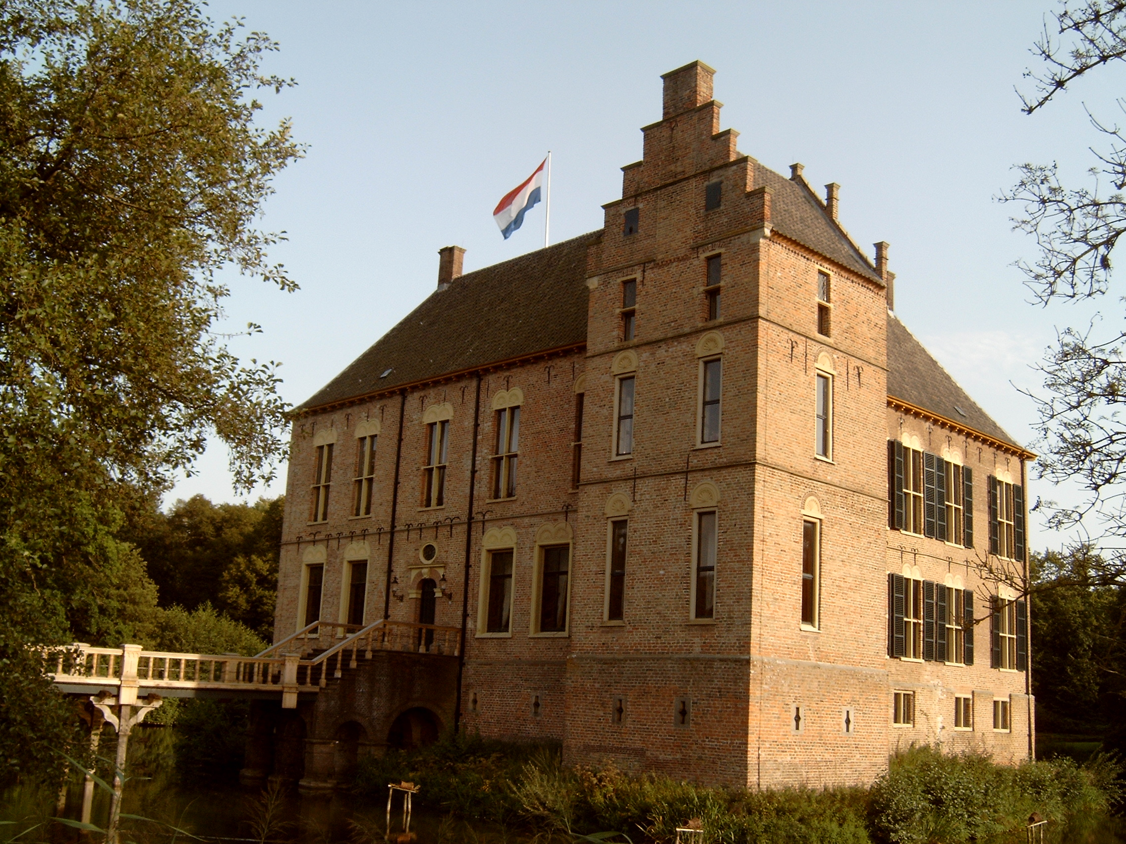 Vorden, kasteel Vorden